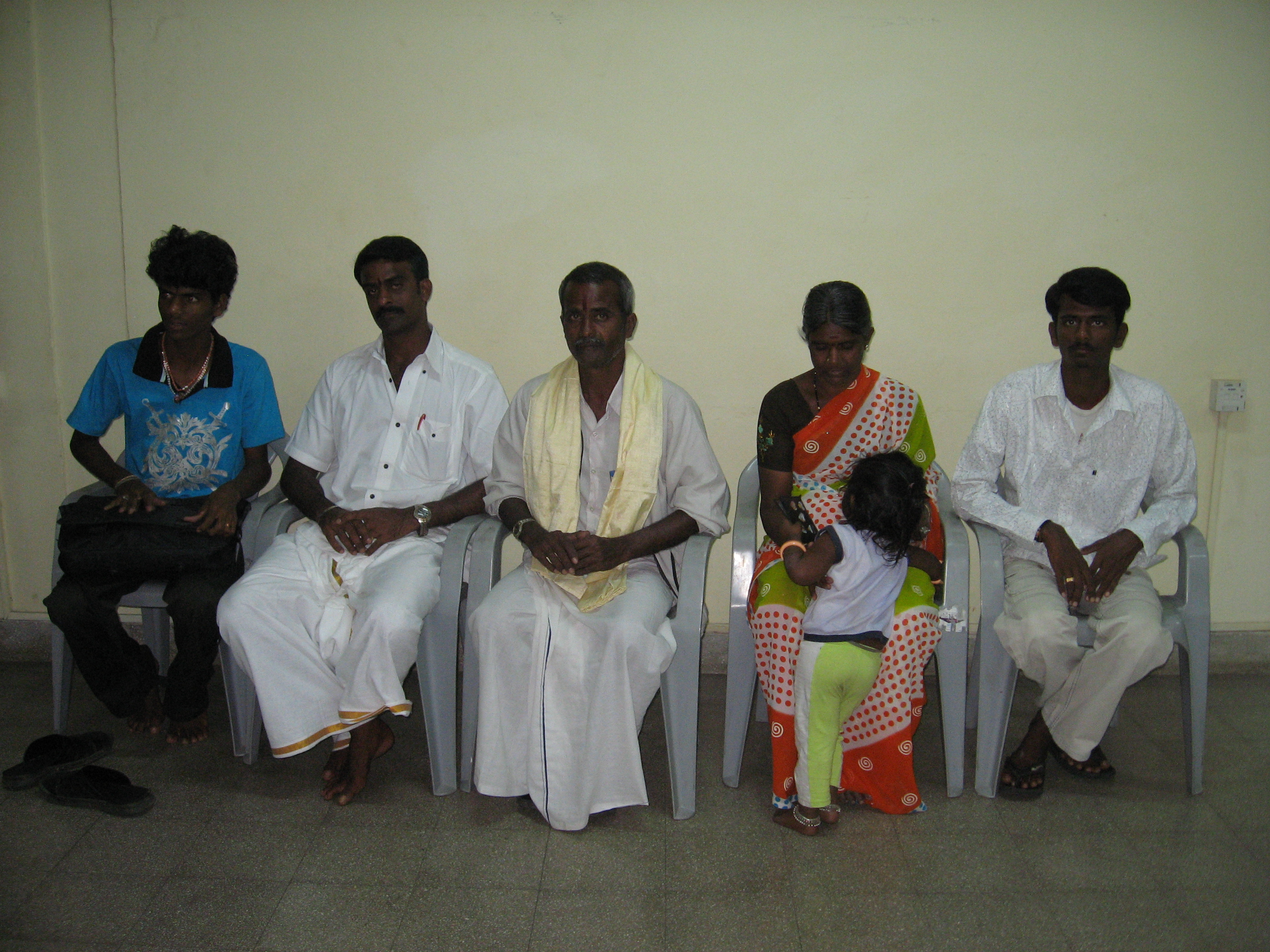 தோல் பாவை நிழற்கூத்து நடத்தும் குடும்பம்